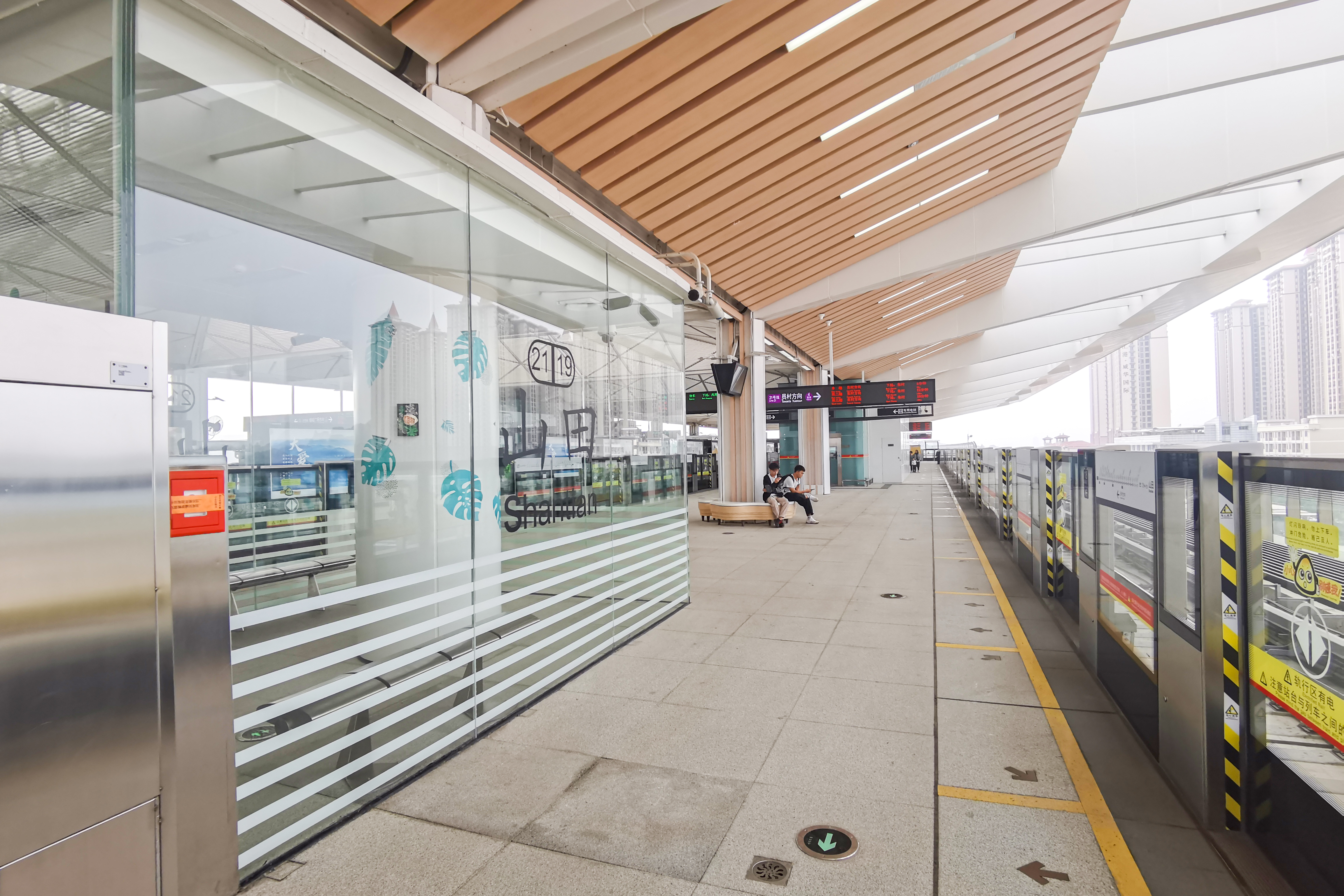 广州地铁山田站